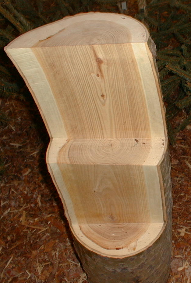 Stamm einer Zitterpappel (Espe)